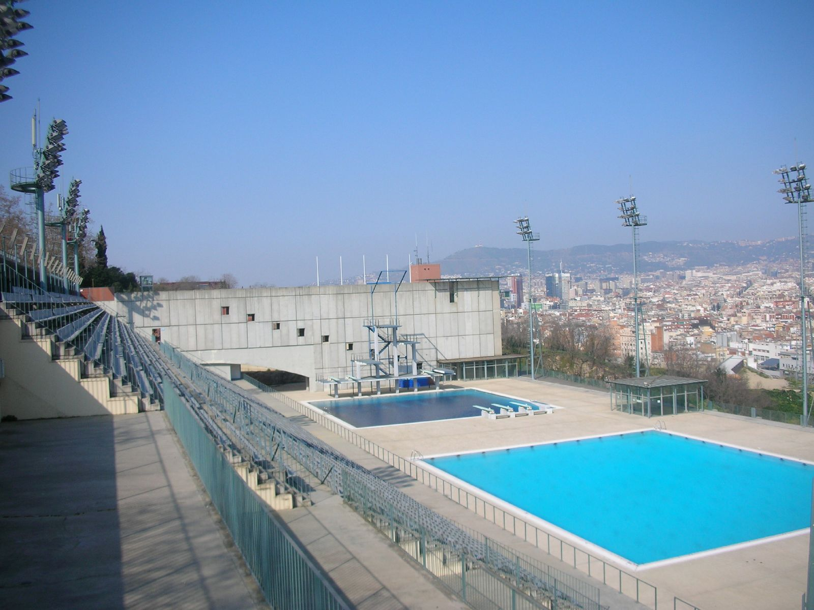 Piscines municipals de Montjuïc, Barcelona, Catalunya.Swimming pool and diving area